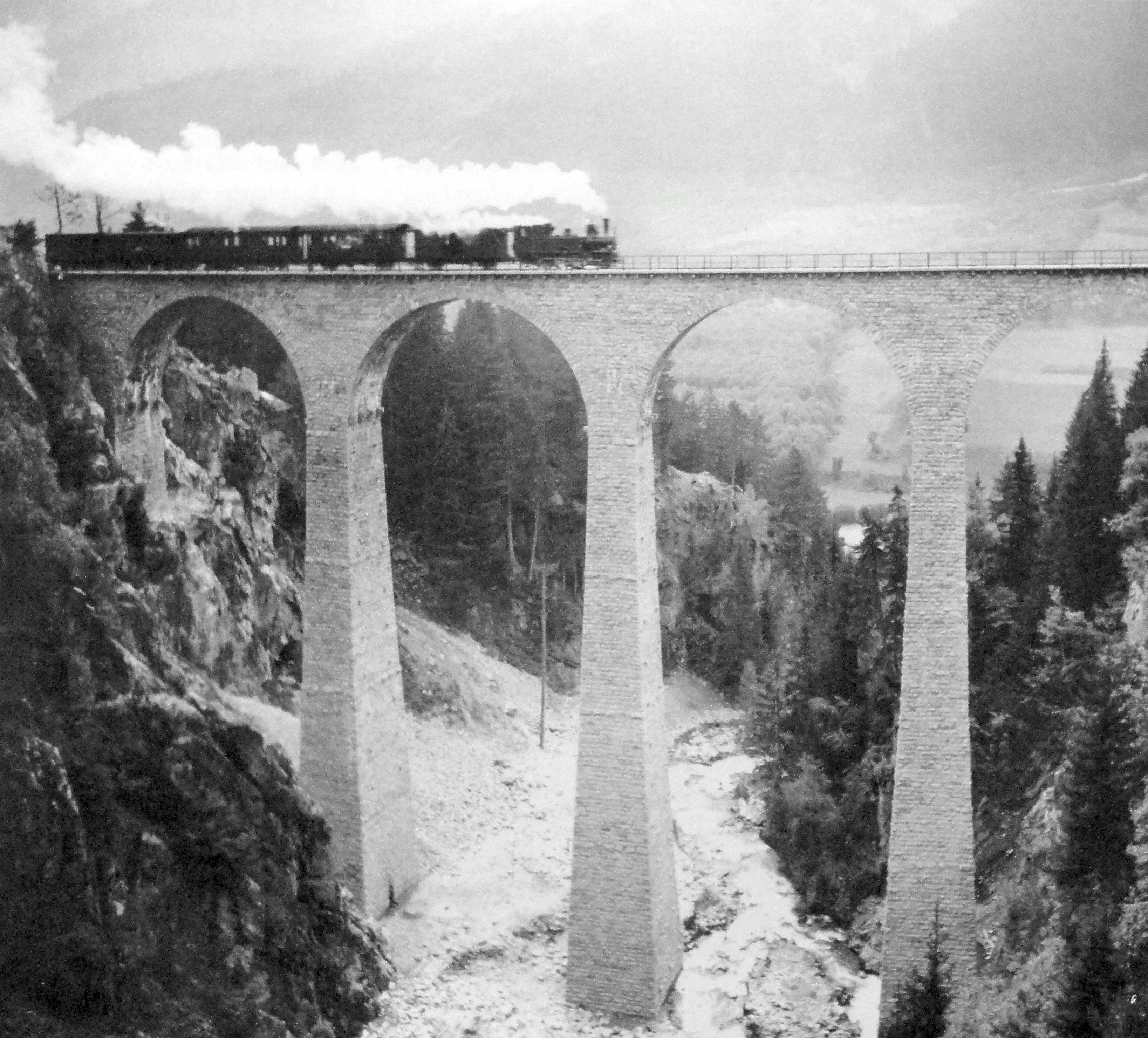 Blick von der alten Russeinerbrücke auf die neue Eisenbahnbrücke, erbaut 1911